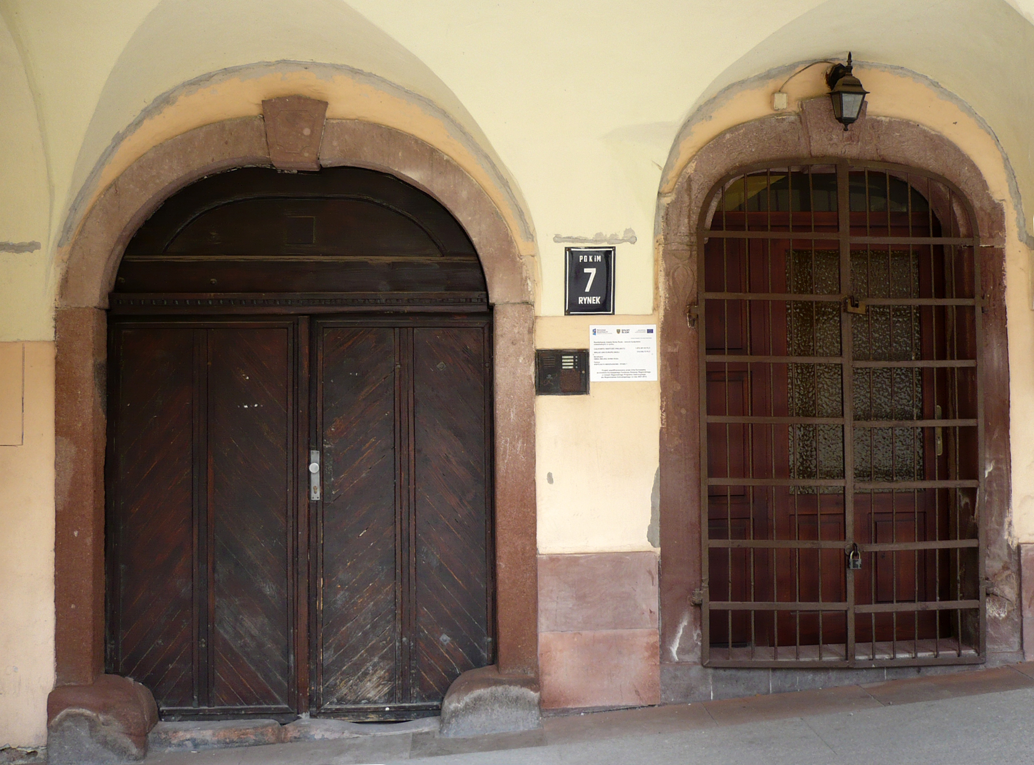 Nowa Ruda, Rynek 7 - brama kamienicy, XVI/XVII, XVIII, 1884 (zabytek nr A/1176 z 31.03.2009)